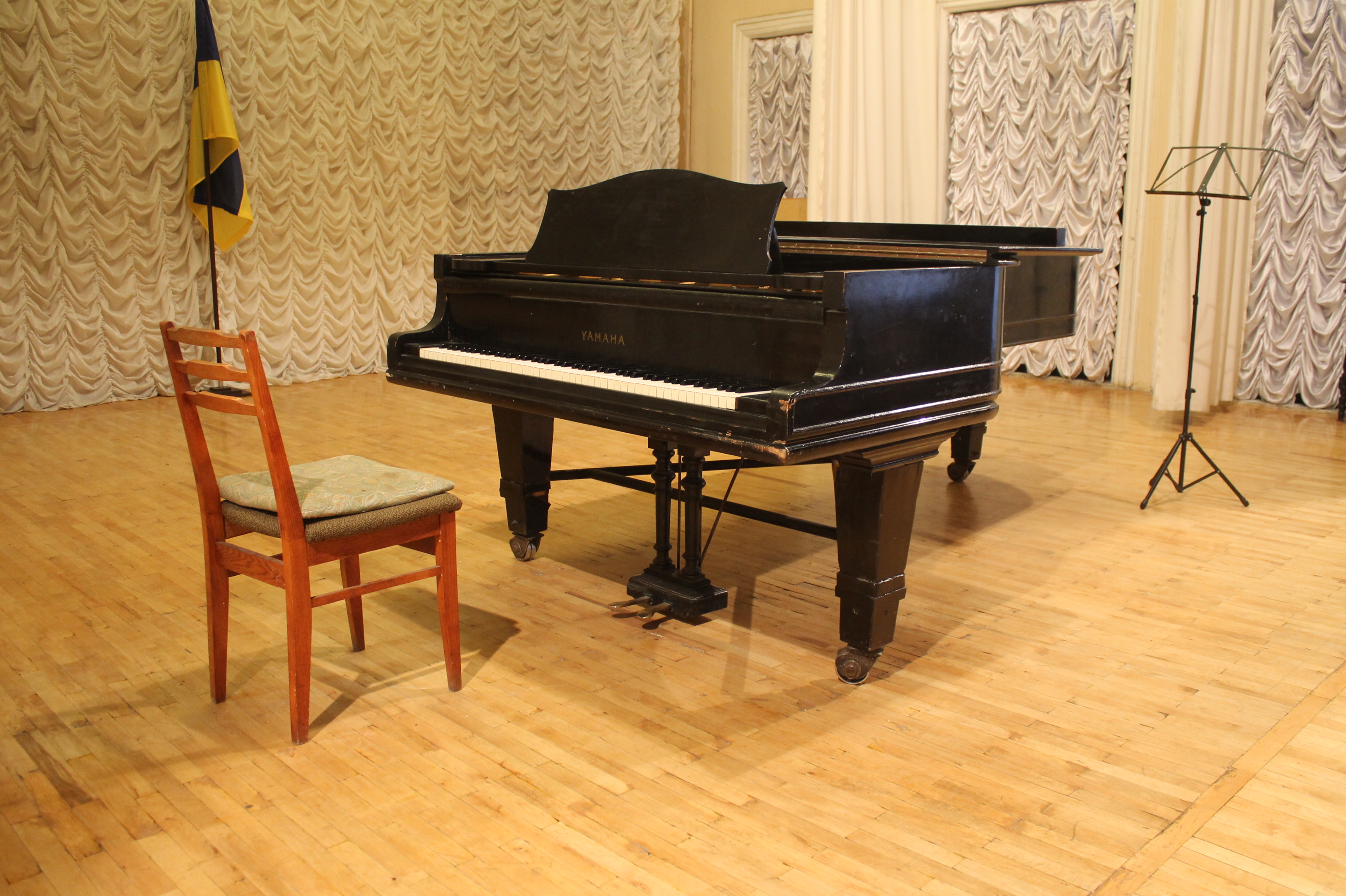 Рояль фірми Yamaha у залі Будинку вчених НАН України. Фотографії з концерту 26 березня 2017 року "Пісні Ф. Шопена в сучасних українських перекладах" у Києві